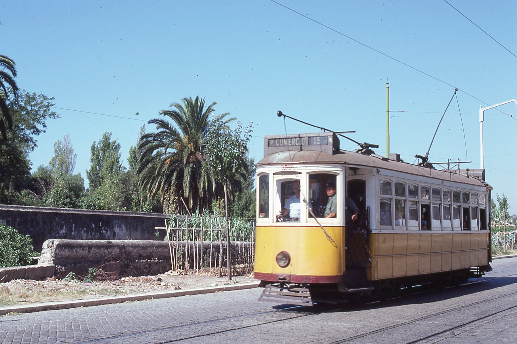 Ligne 15 direction place du Commerce en 1977 ( cette ligne existe encore à ce jour, mais avec des trams modernes, et la ligne ne va plus à ESTADIO. Algés Tram 350 de la série 343 - 362 (il existe encore de cette série le tram 348 au musée des Trams de Lisbonne et les trams 351 - 353 - 359 - 360 - 361 -362 chez des particuliers et le 343 à Mar del Plata et le 350 á Córdoba (Republique Argentine) Les trams 344 - 345 - 352 - 354 - 356 - 357 sont démolis.